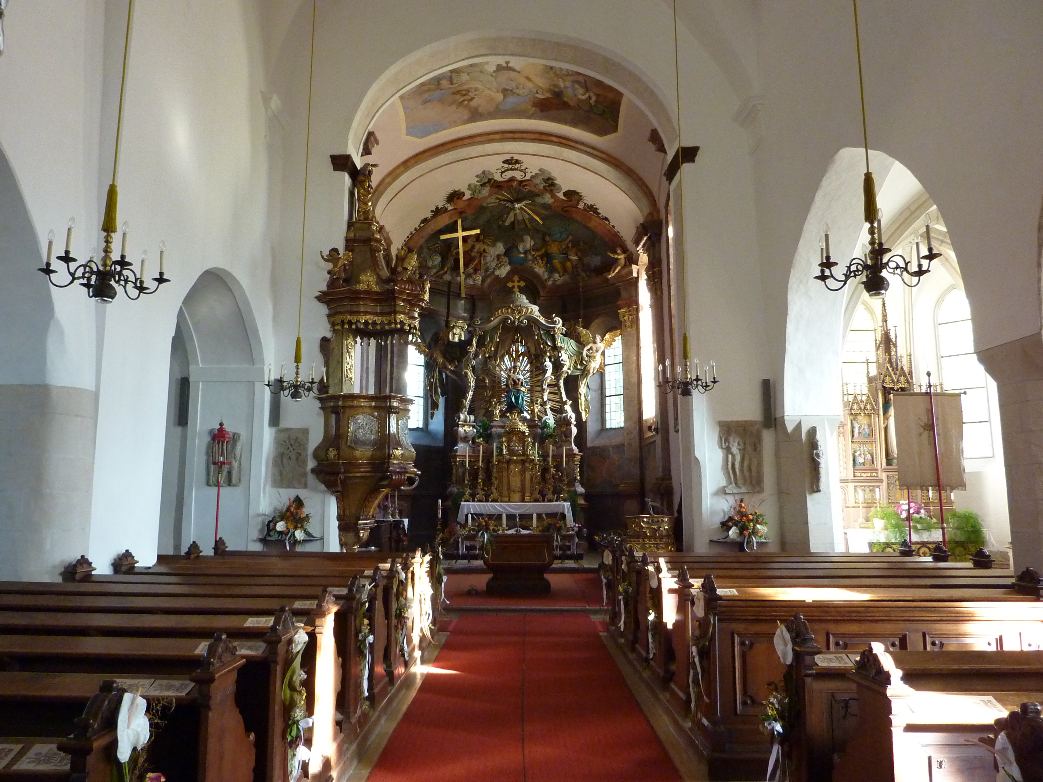 Pfarrkirche Mariae Geburt, Gobelsburg, Langenlois, Niederösterreich